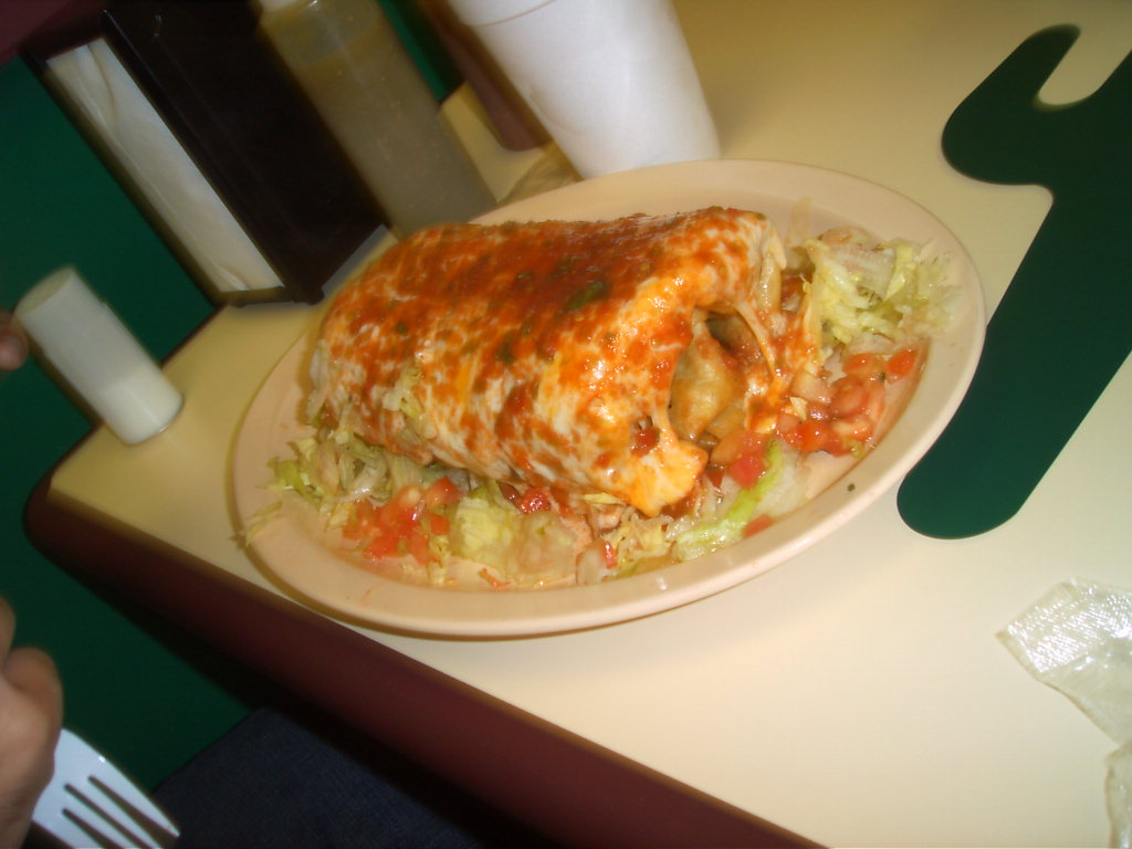 Cchimichanga